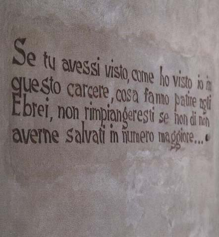 Focherinifrase